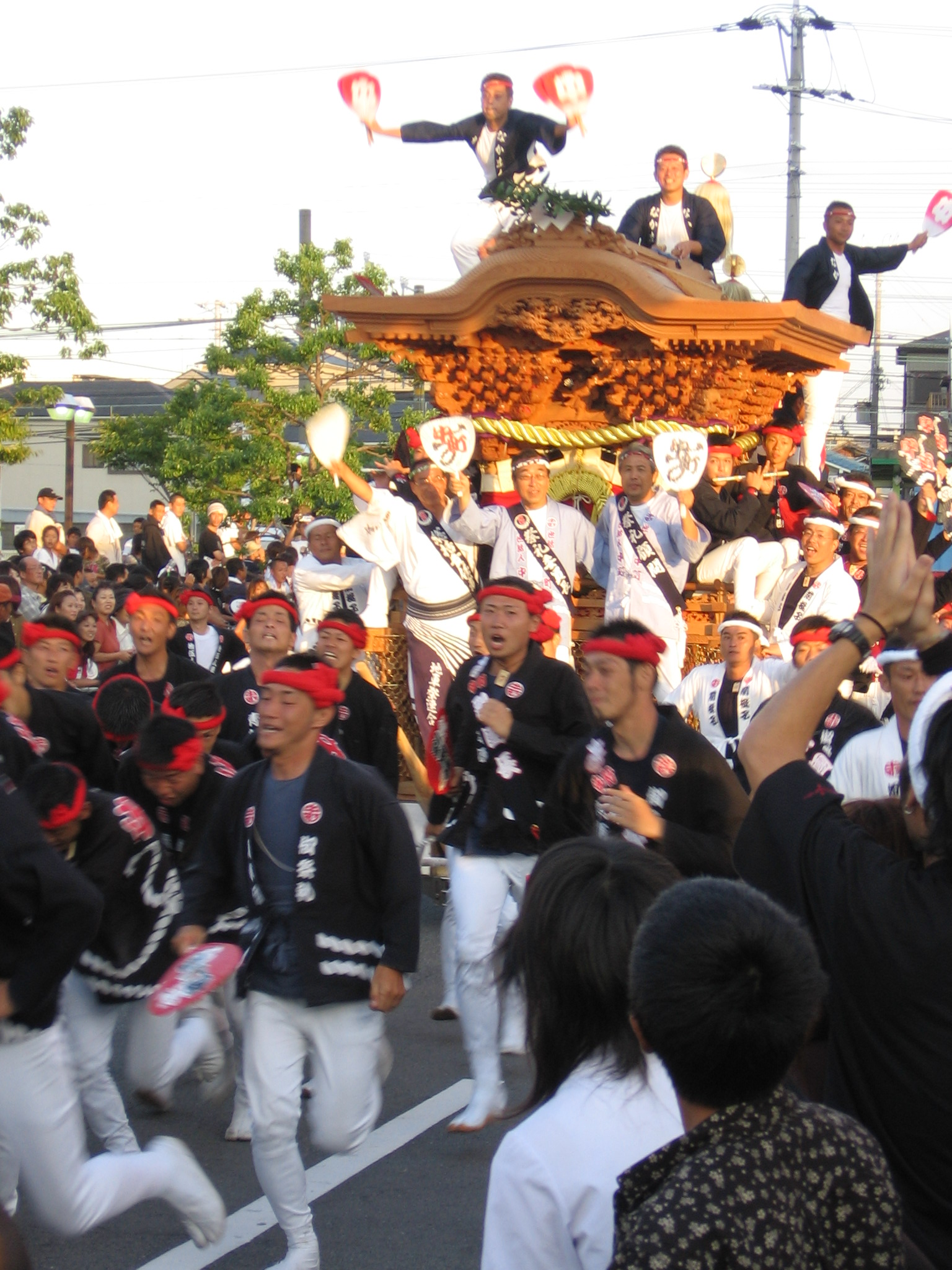 Photo prise lors du Kishiwada danjiri Matsuri (photo personnelle de l'auteur)